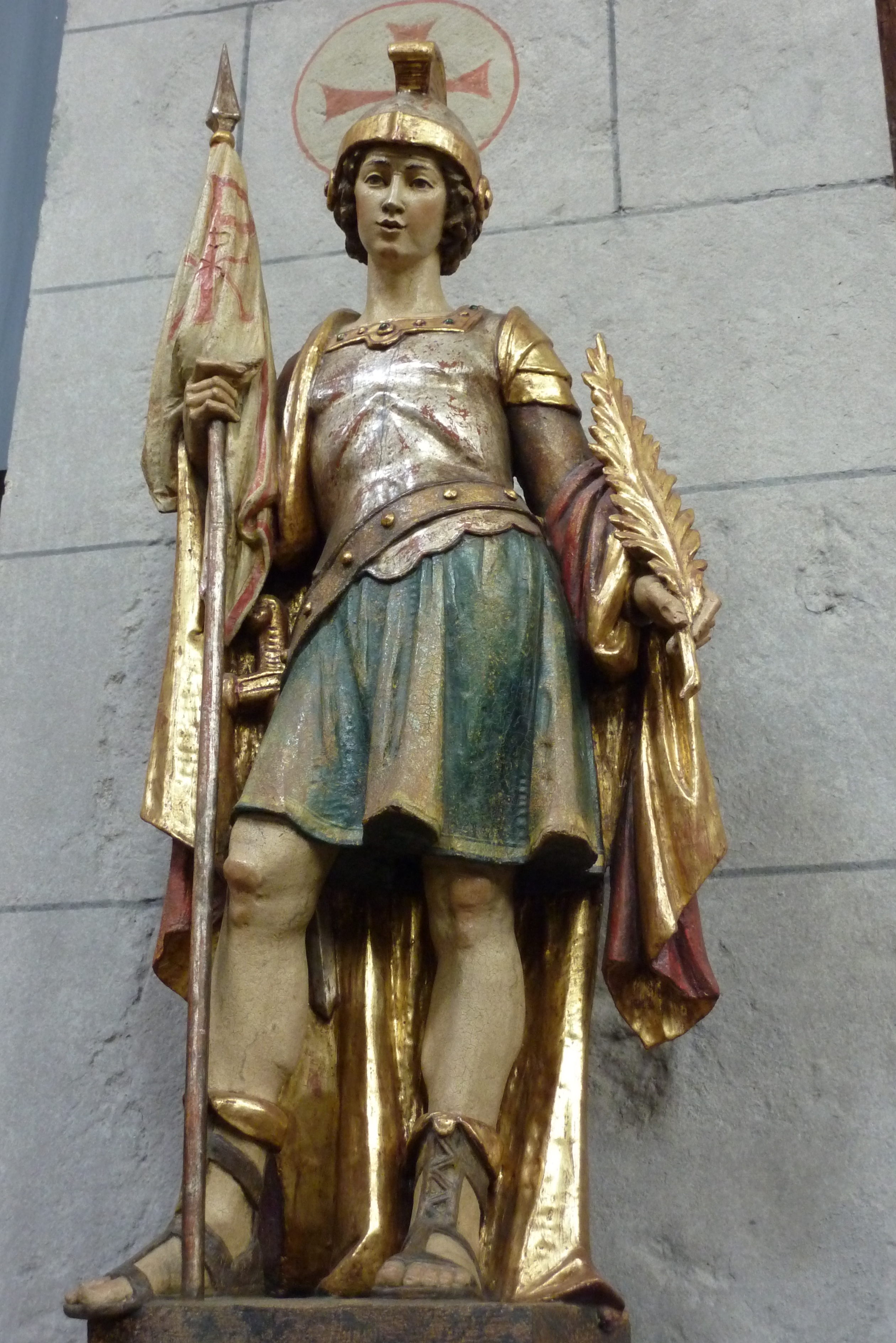 Oberbreisig, Katholische Pfarrkirche St. Viktor, hl. Viktor von Xanten, 1995